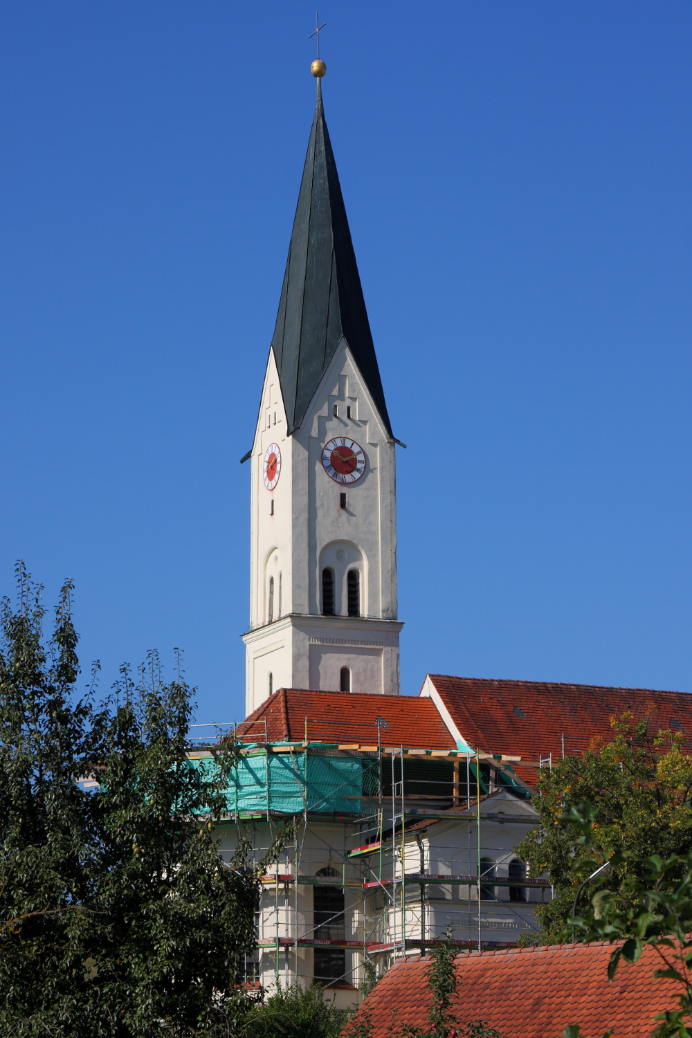 Neubau 1878; mit Ausstattung.This is a photograph of an architectural monument.